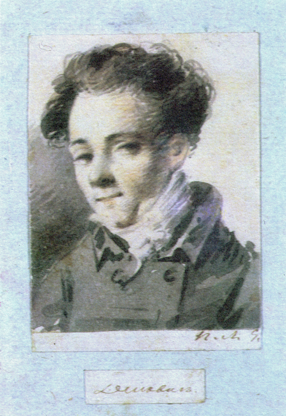 Дельвиг Антон Антонович (1798—1831) — русский поэт, литературный критик, журналист; друг и однокашник А. С. Пушкина. Конец 1810-х гг. Художник П. Л. Яковлев